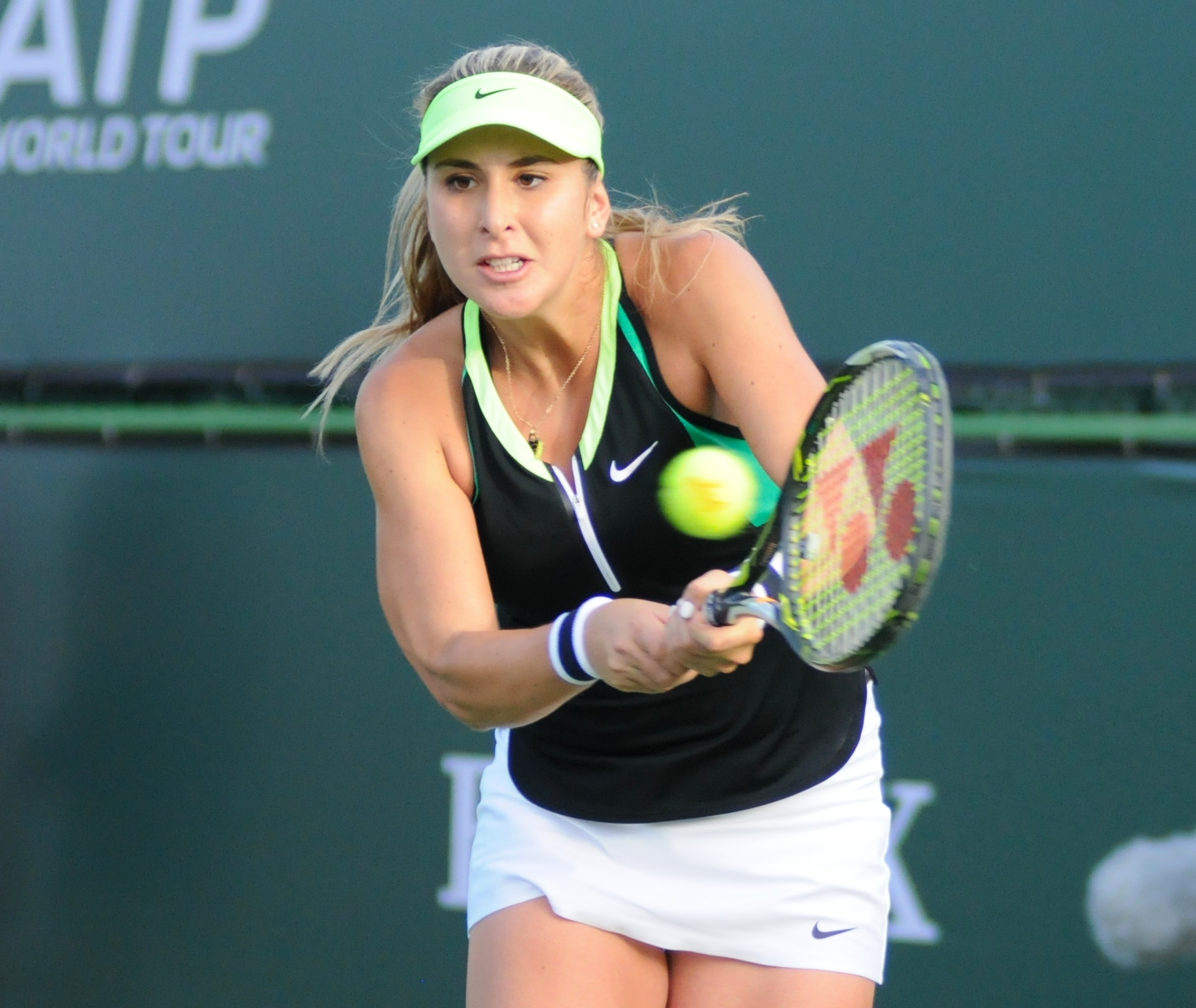 Belinda Bencic in 2017 BNP Paribas Open